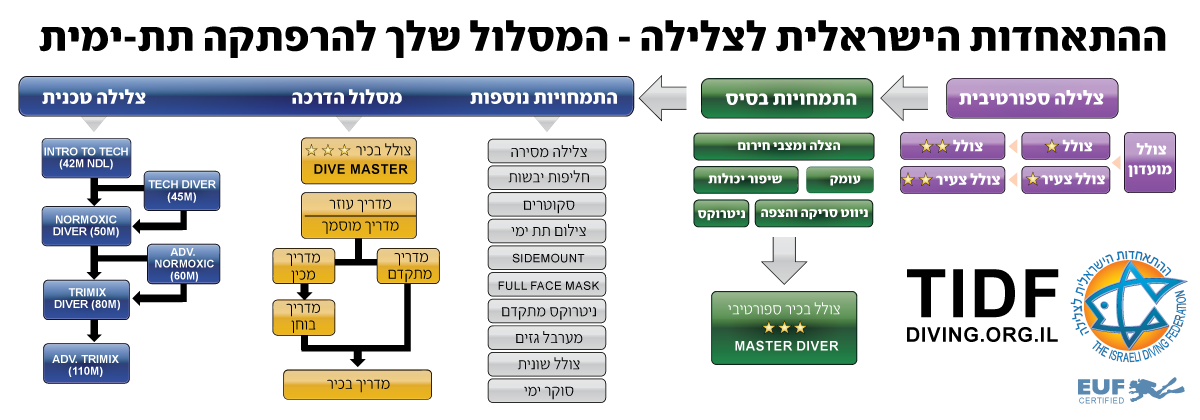 ההתאחדות הישראלית לצלילה עורכת קורסי הכשרה לצלילה ספורטיבית